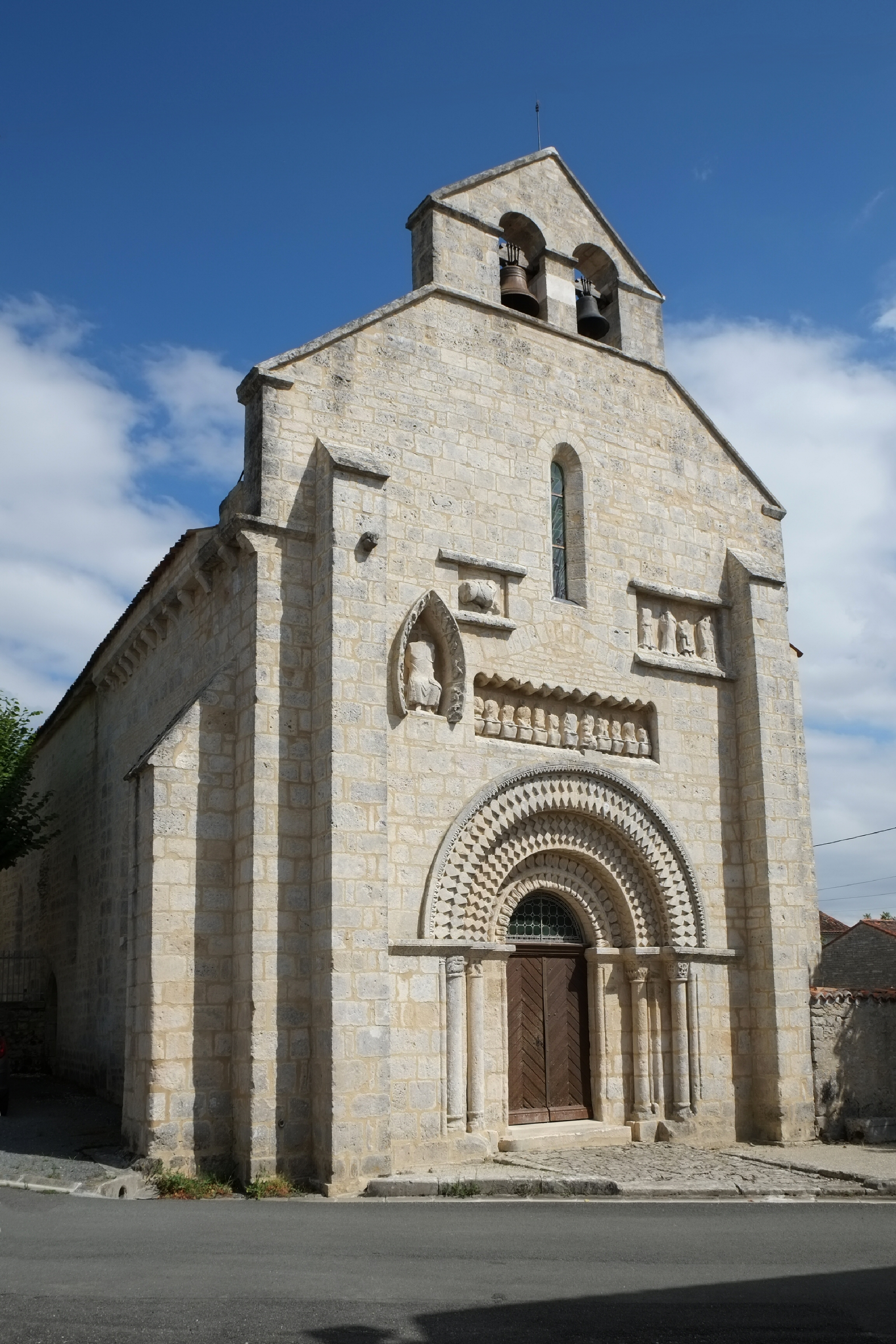 Église Notre-Dame-de-l'Assomption Fontaine-Chalendray Charente-Maritime France